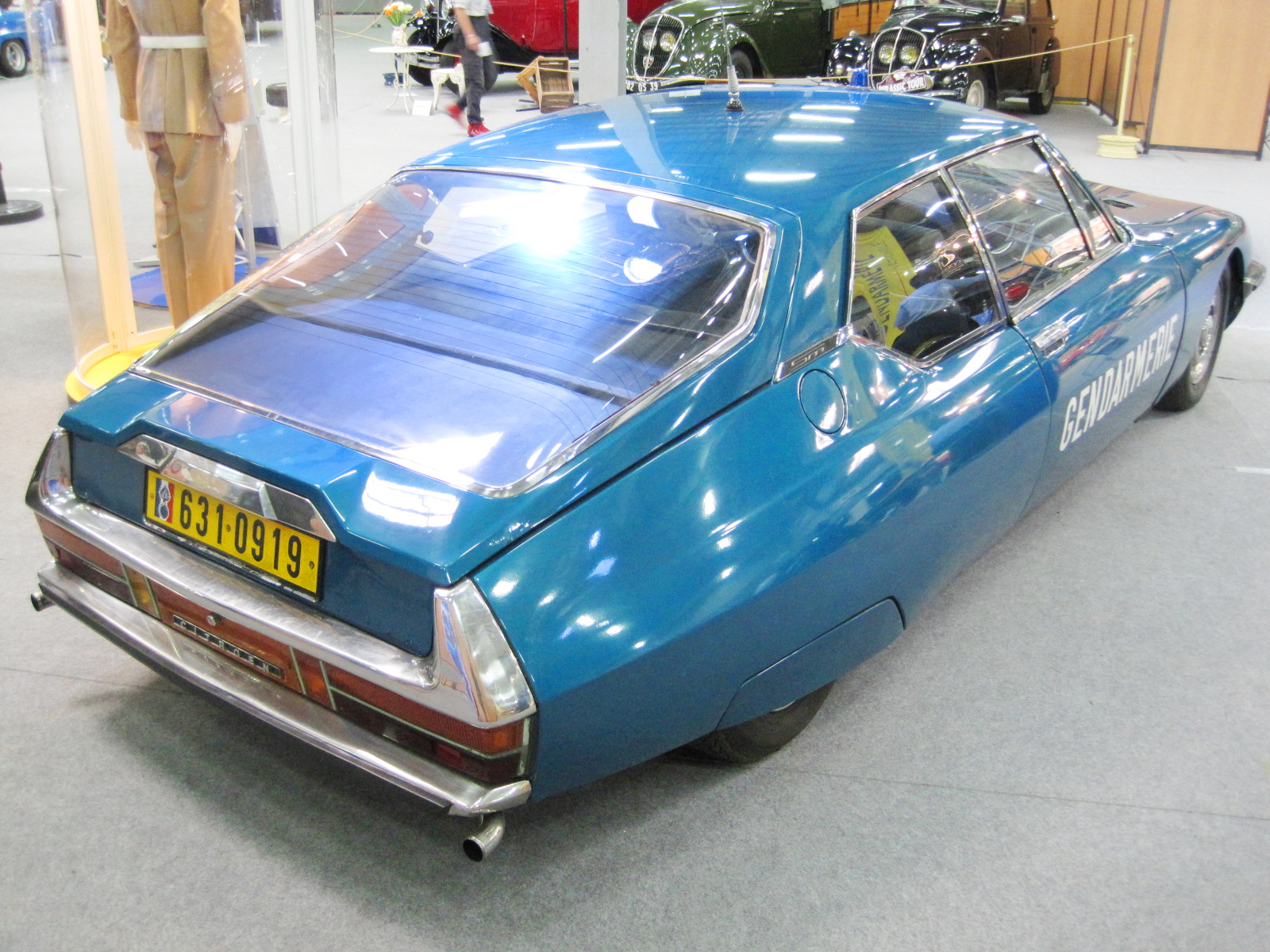 Citroën SM